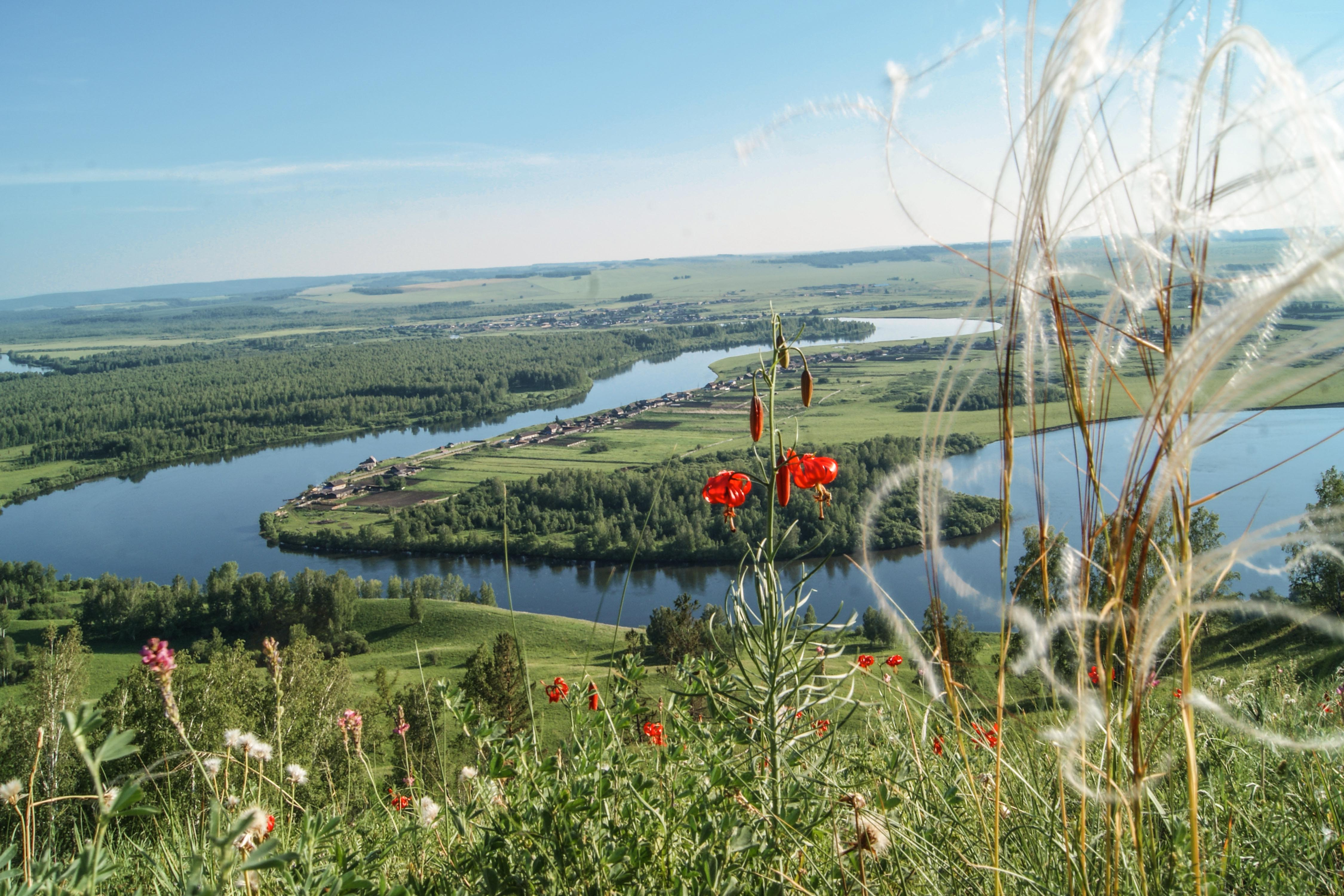 Стоянка Пискуновка: 5 км ниже поселка, правый берег р. Енисей, Пискуновка, Ирбейский район, Красноярский край